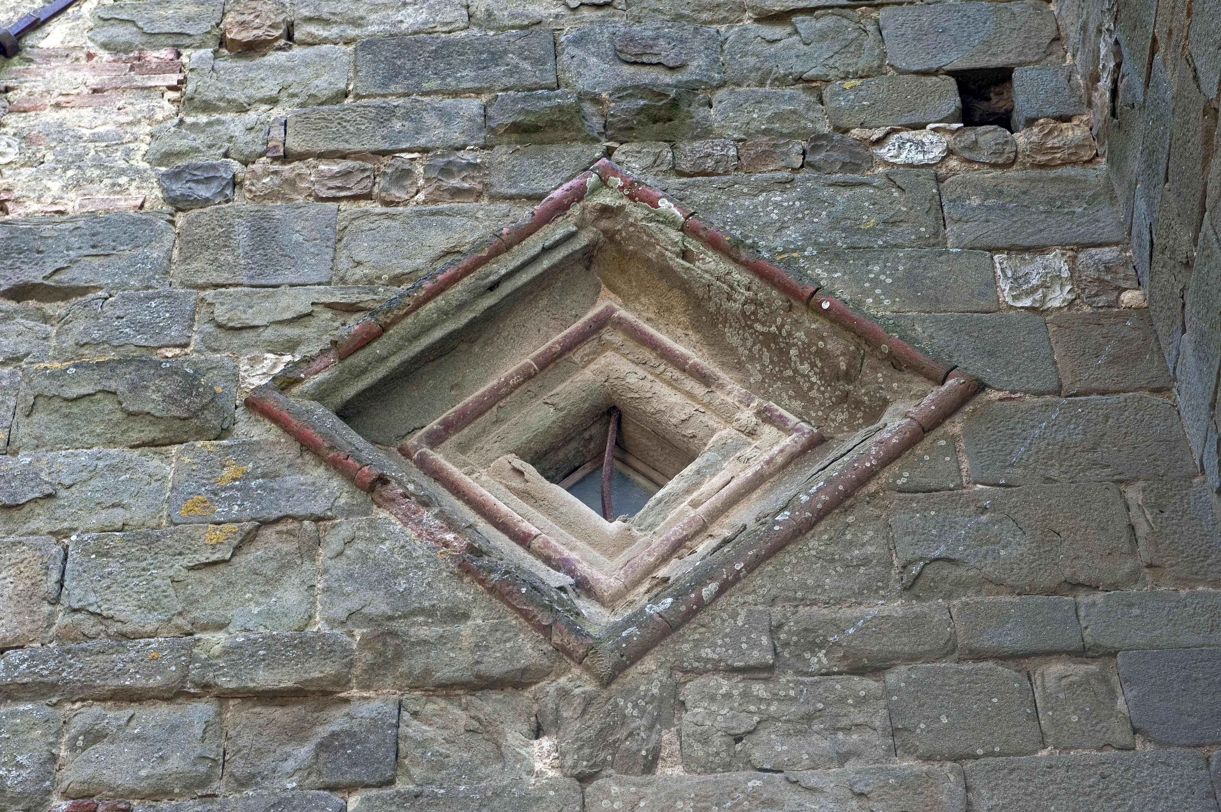 Finestra romboidale di epoca romanica (XII secolo) della chiesa di San Michele Arcangelo a Castiglioni, Montespertoli